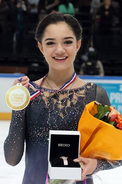 Евгения Медведева на церемонии награждения Trophée de France 2016